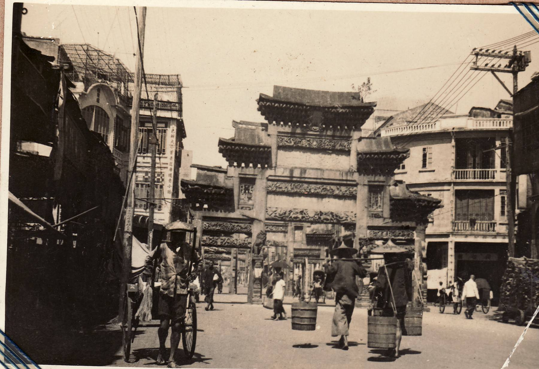 位於廣州中華中路的四牌樓（現解放中路一帶，其中四座已於文化大革命時期被毀）